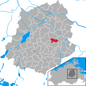 Gnevkow, Landkreis Demmin, Mecklenburg-Vorpommern